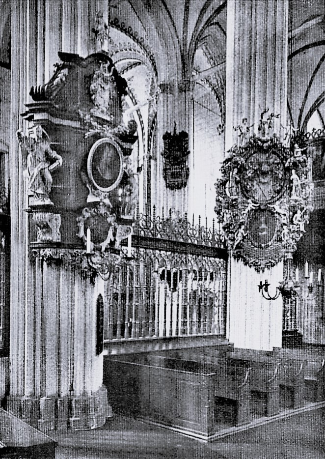 Blick aus dem Binnenchor in die Südervorhalle. Chorpfeiler um 1260, Messinggitter 1498, Epitaphien von A. M. Rodde (1729) und C. v. Deginck.